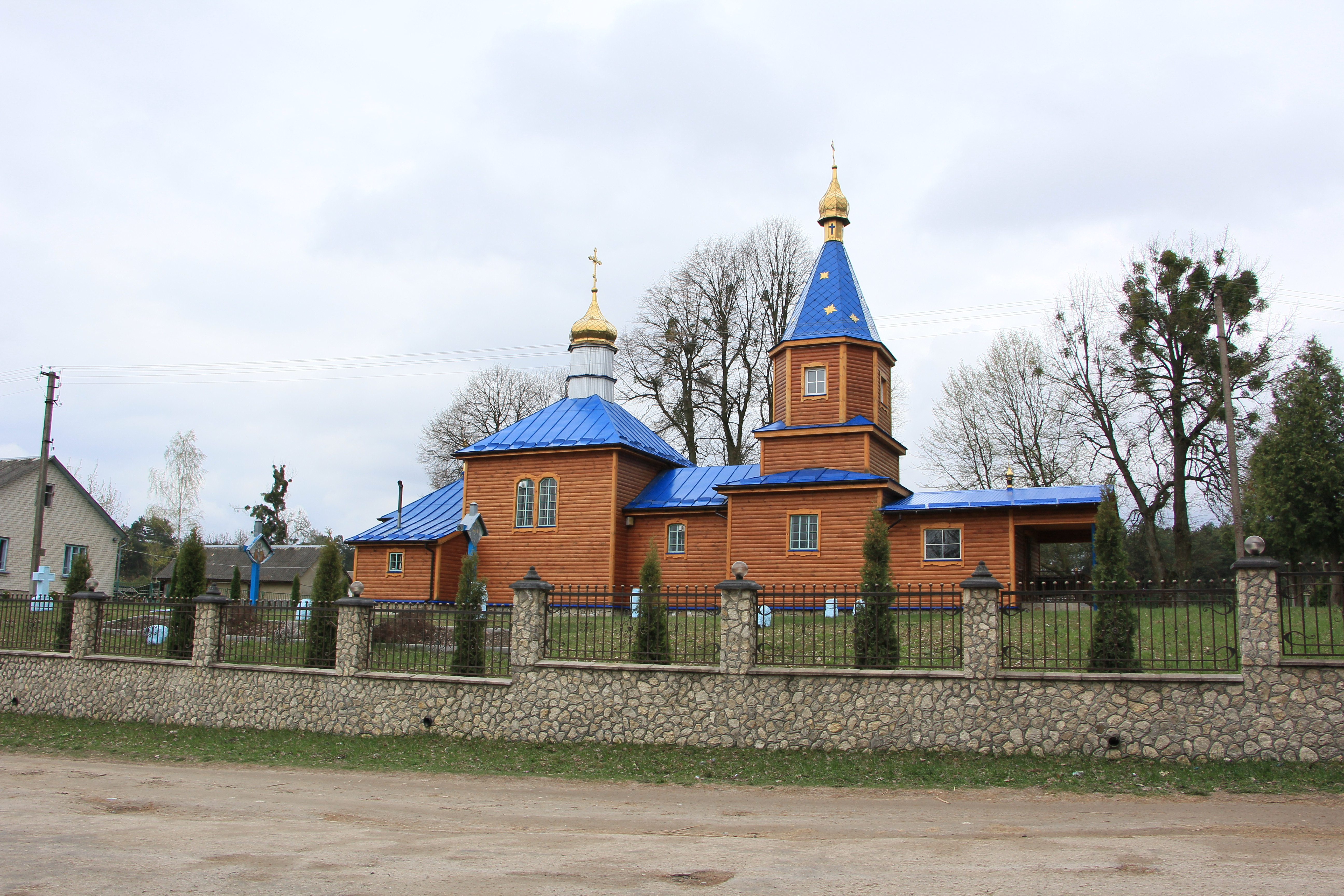 Дерев'яна церква в селі Кімната Кременецького району, Тернопільської області